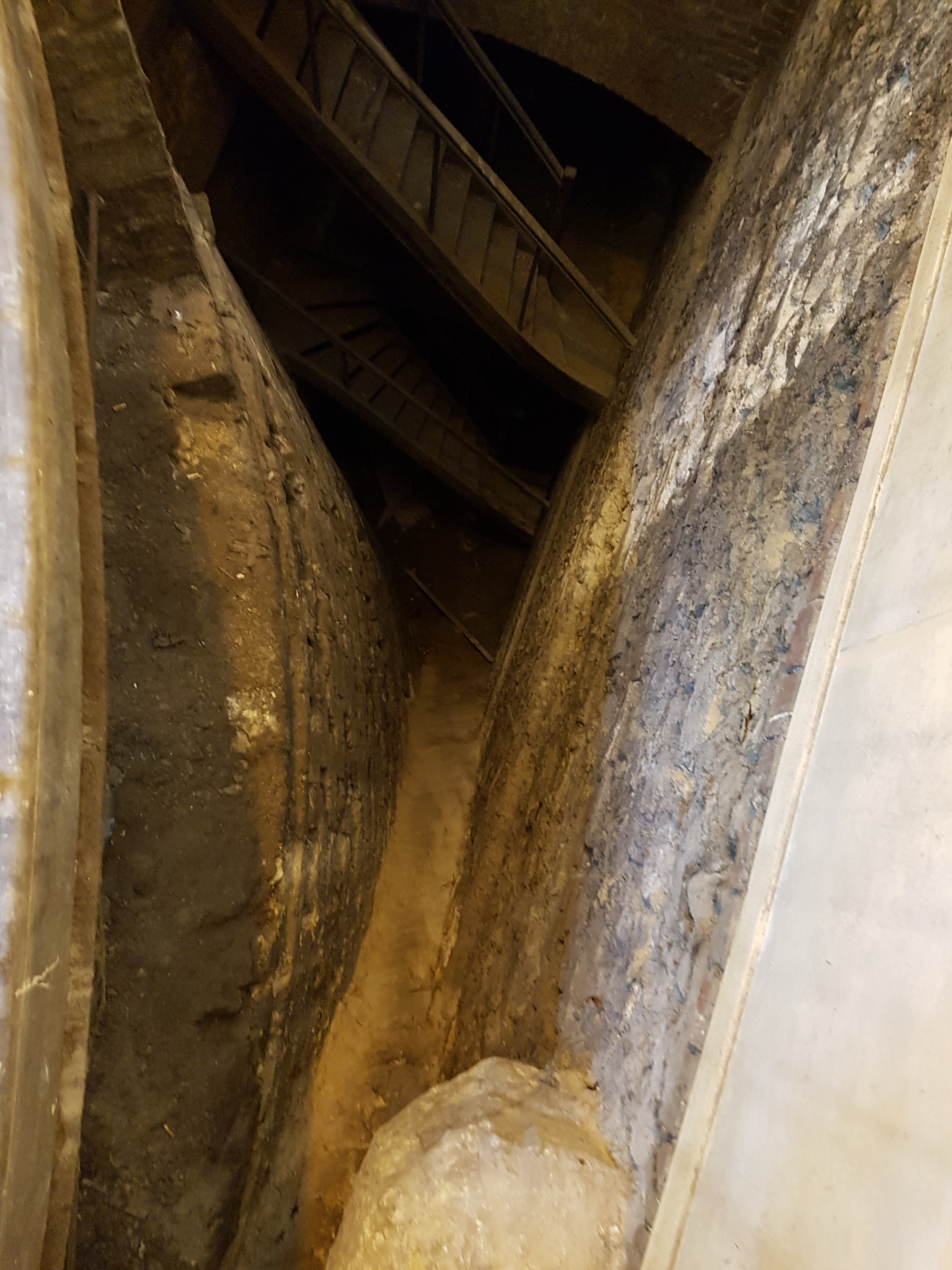 Vestige de la Tour de la Pucelle.